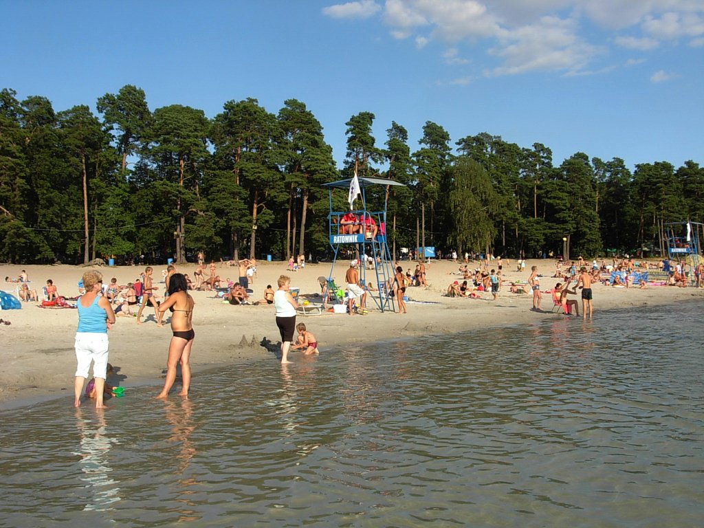 Plaża w Przyjezierzu